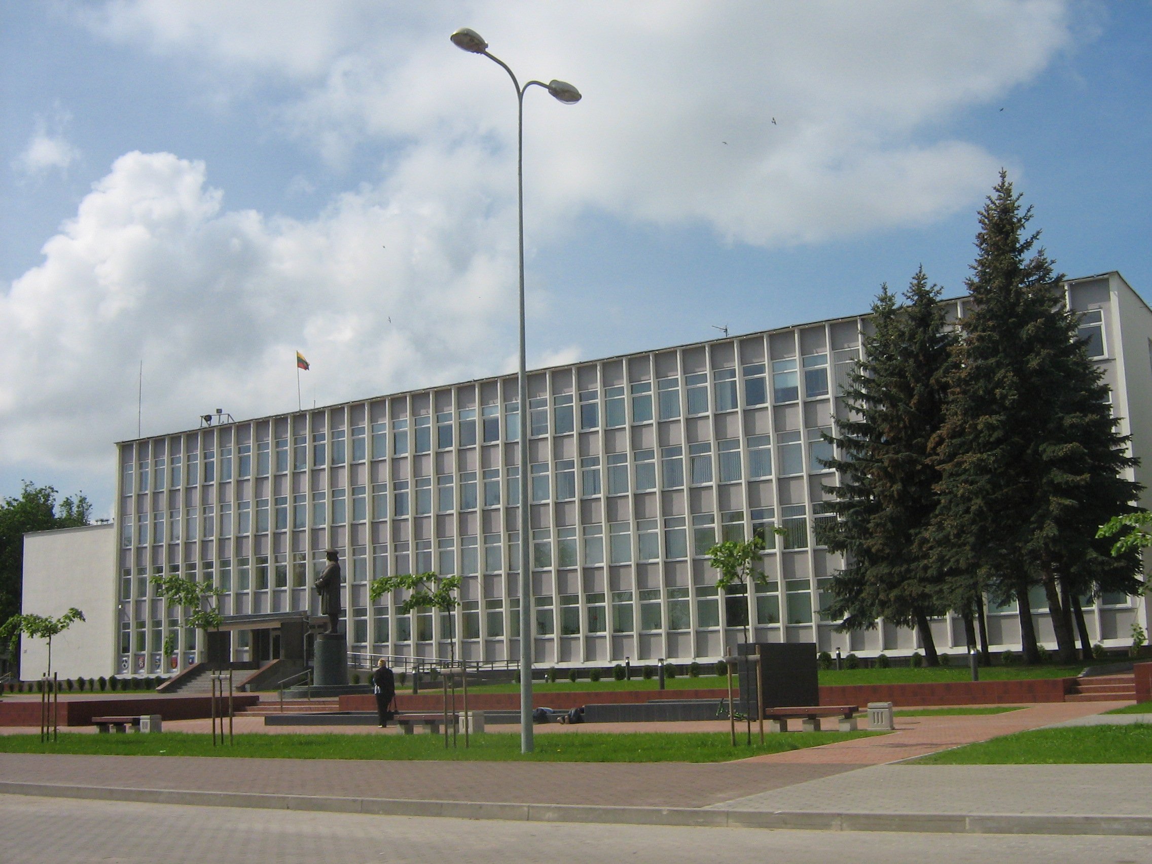 Jonavos savivaldybė